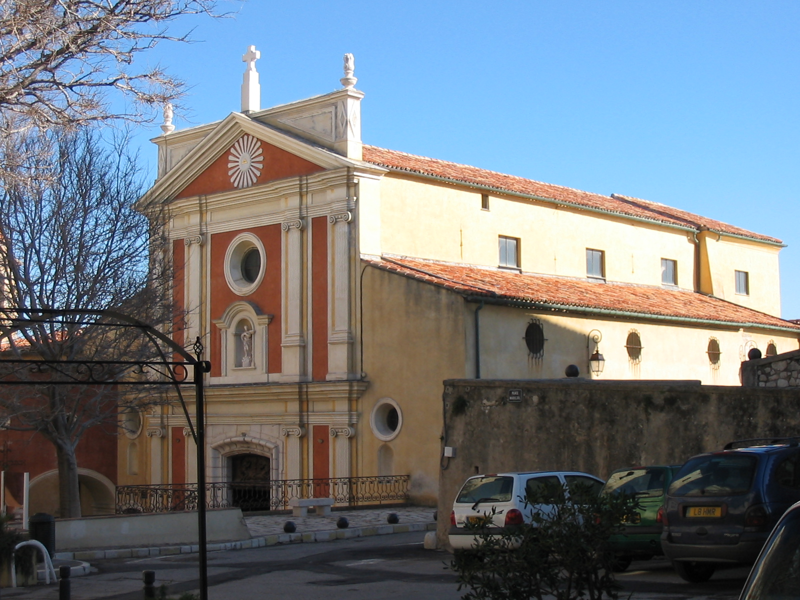 Cathédrale d'Antibes (Alpes-Maritimes).